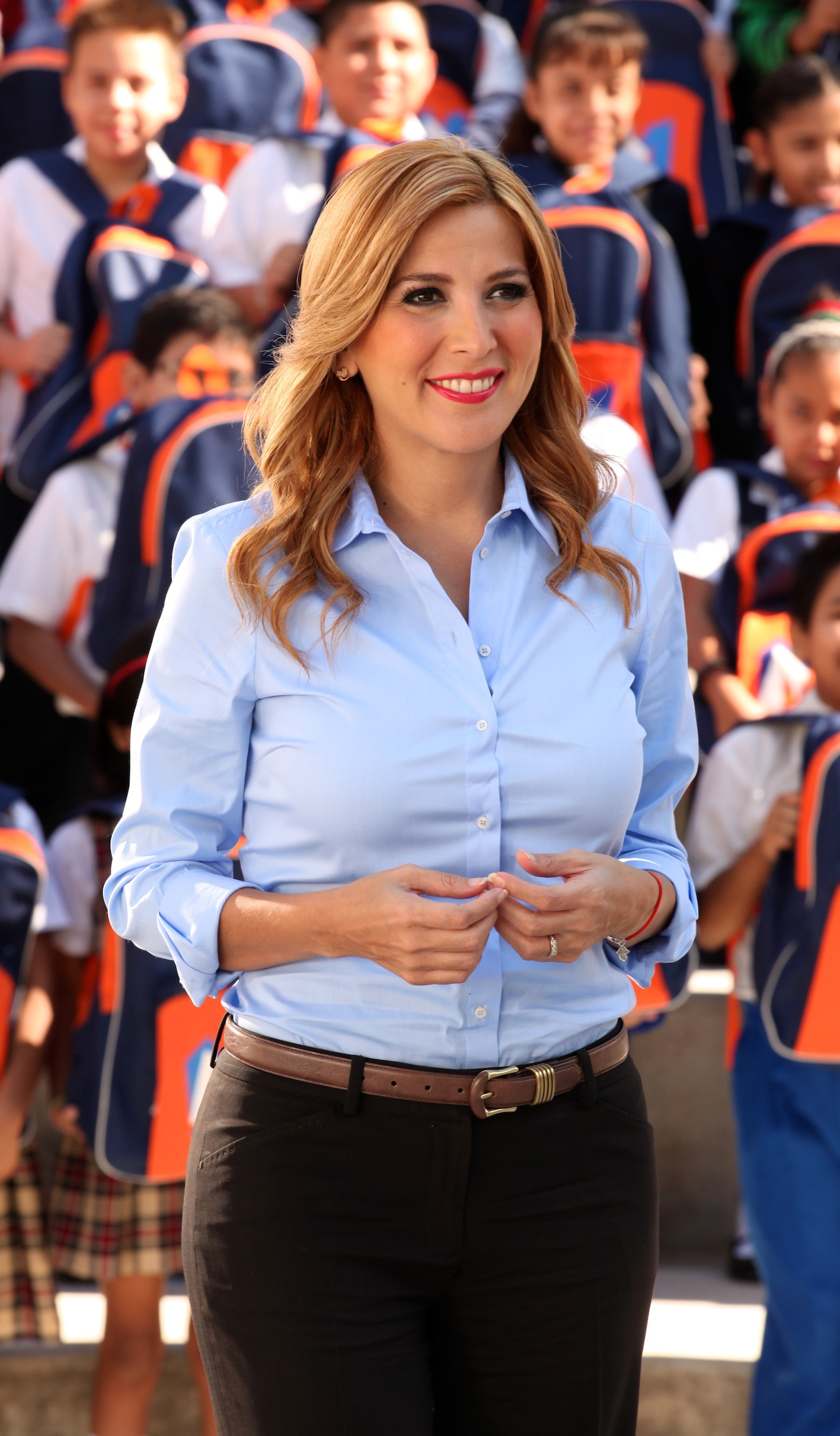 margarita arellanes cervantes